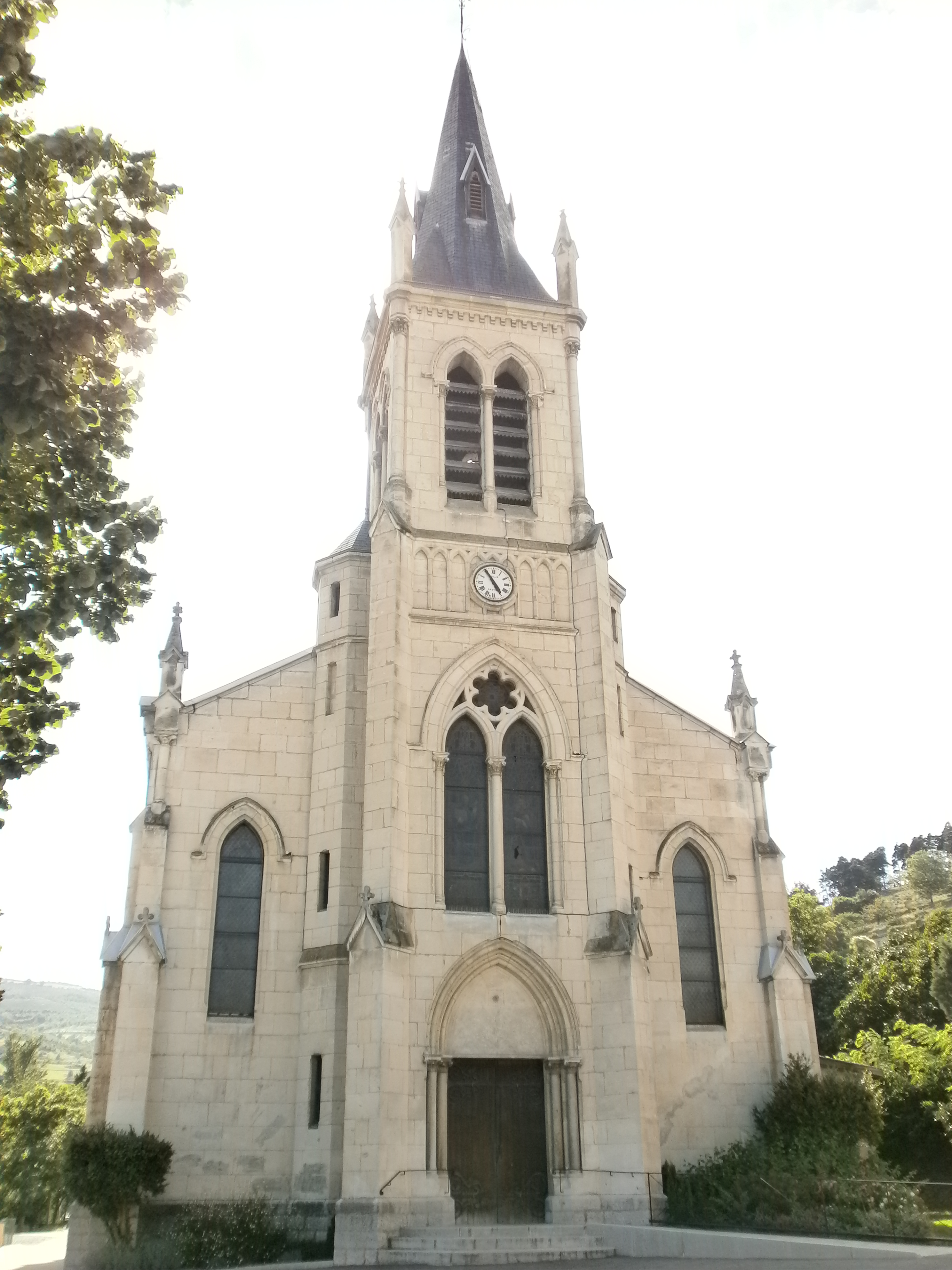 Eglise Saint-Marcel de Saint-Marcel-lès-Annonay, 30 août 2014.